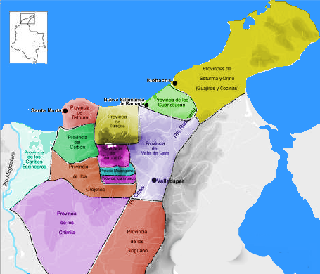 Provincias Gobernacion de Santa Marta. 1500